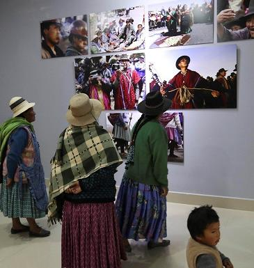 Interior del Museo Bolivia